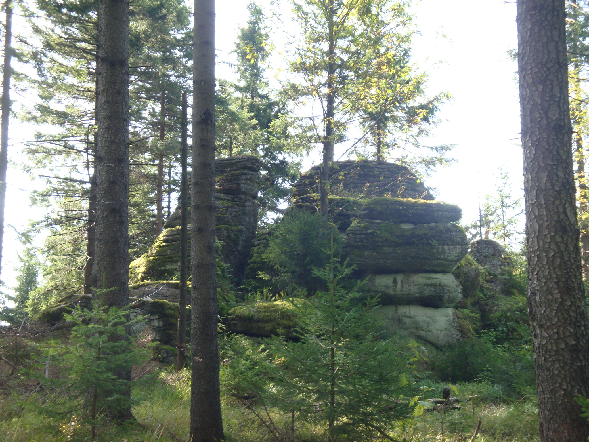 Gipfelfelsen des Riesenberges